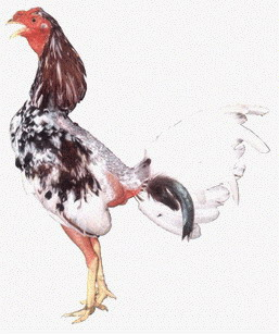 Gallo de pelea desbarbado, descrestado y acicalado a la usanza de Cuba